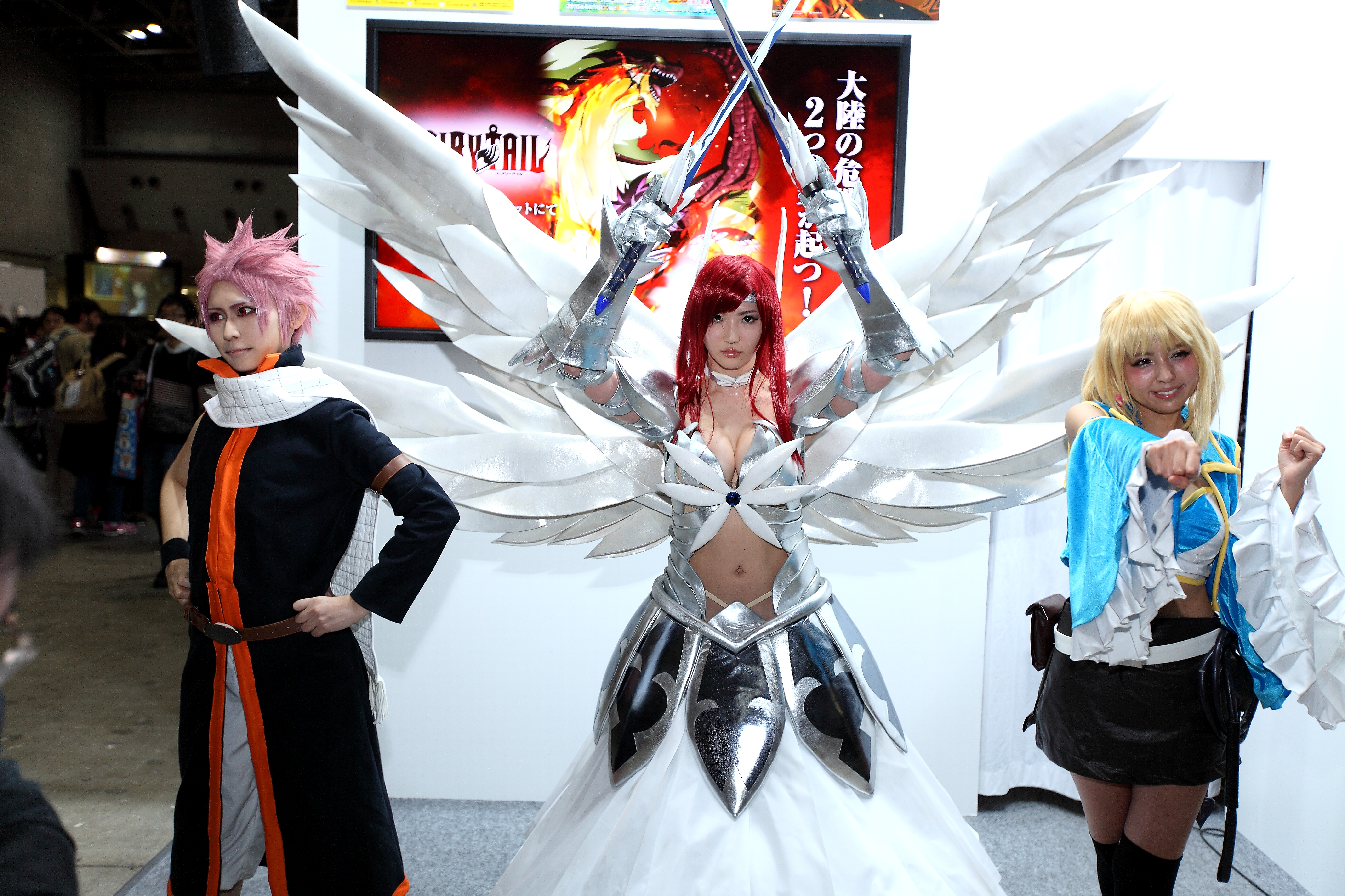 AnimeJapan 2015，《魔導少年》cosplayer群。